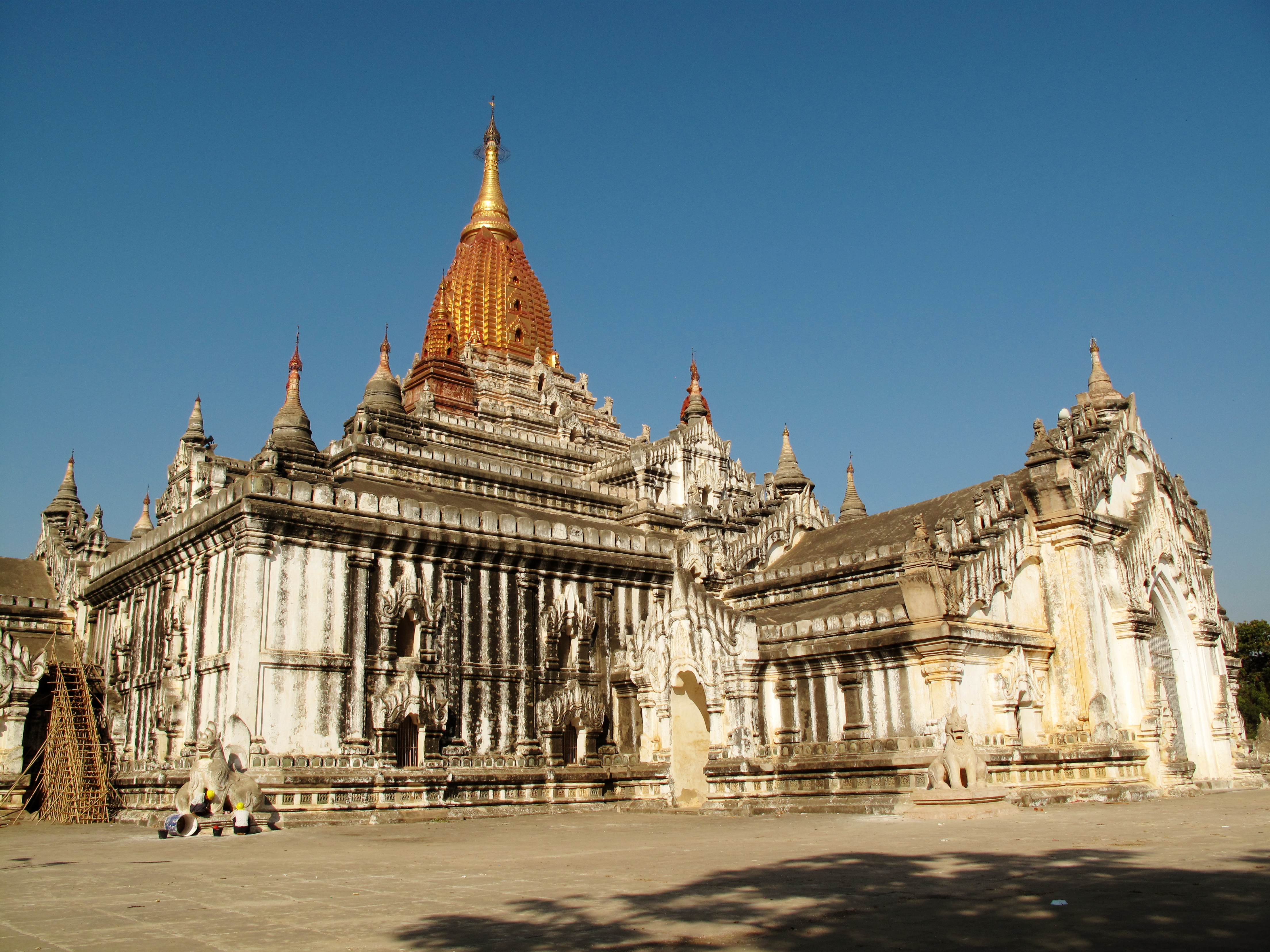 Ananda Pahto